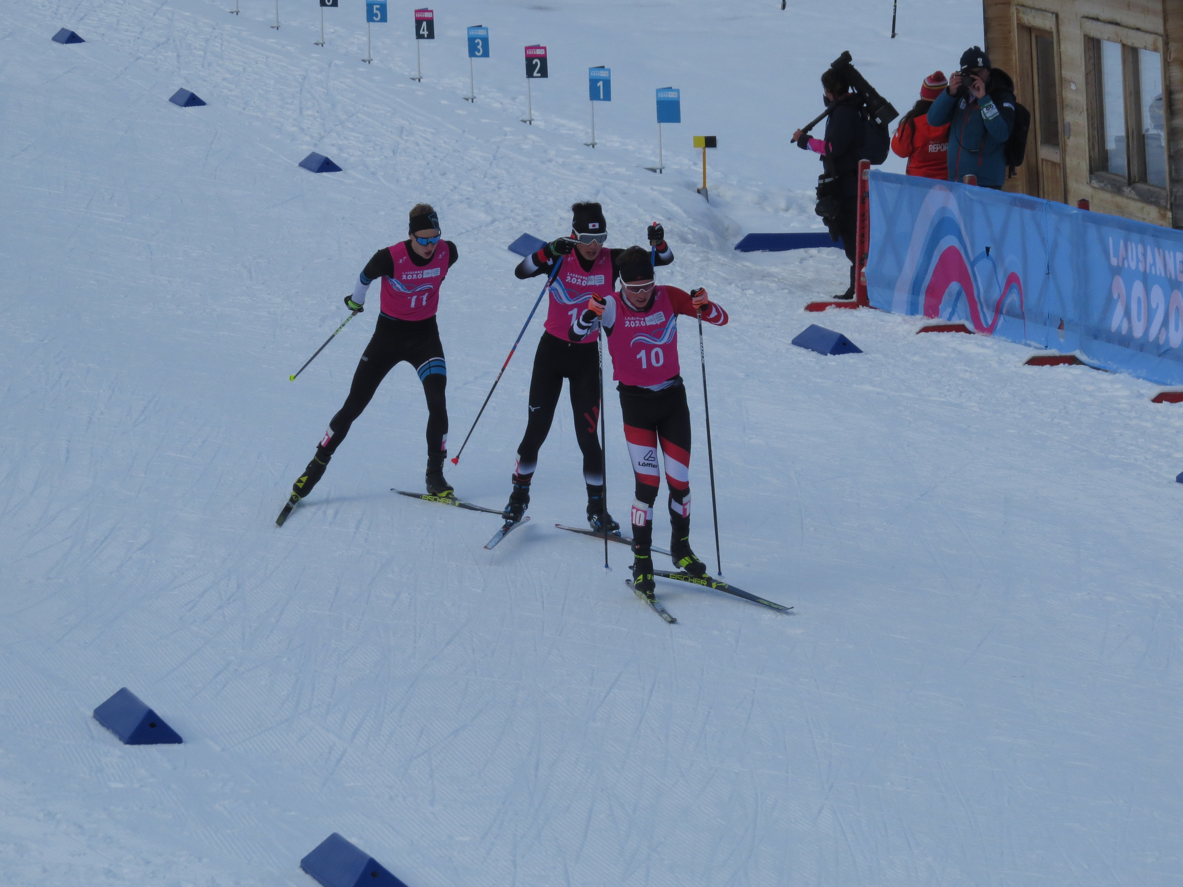 Severin Reiter, Yuto Nishikata et Markkus Alter après un tour (2km).